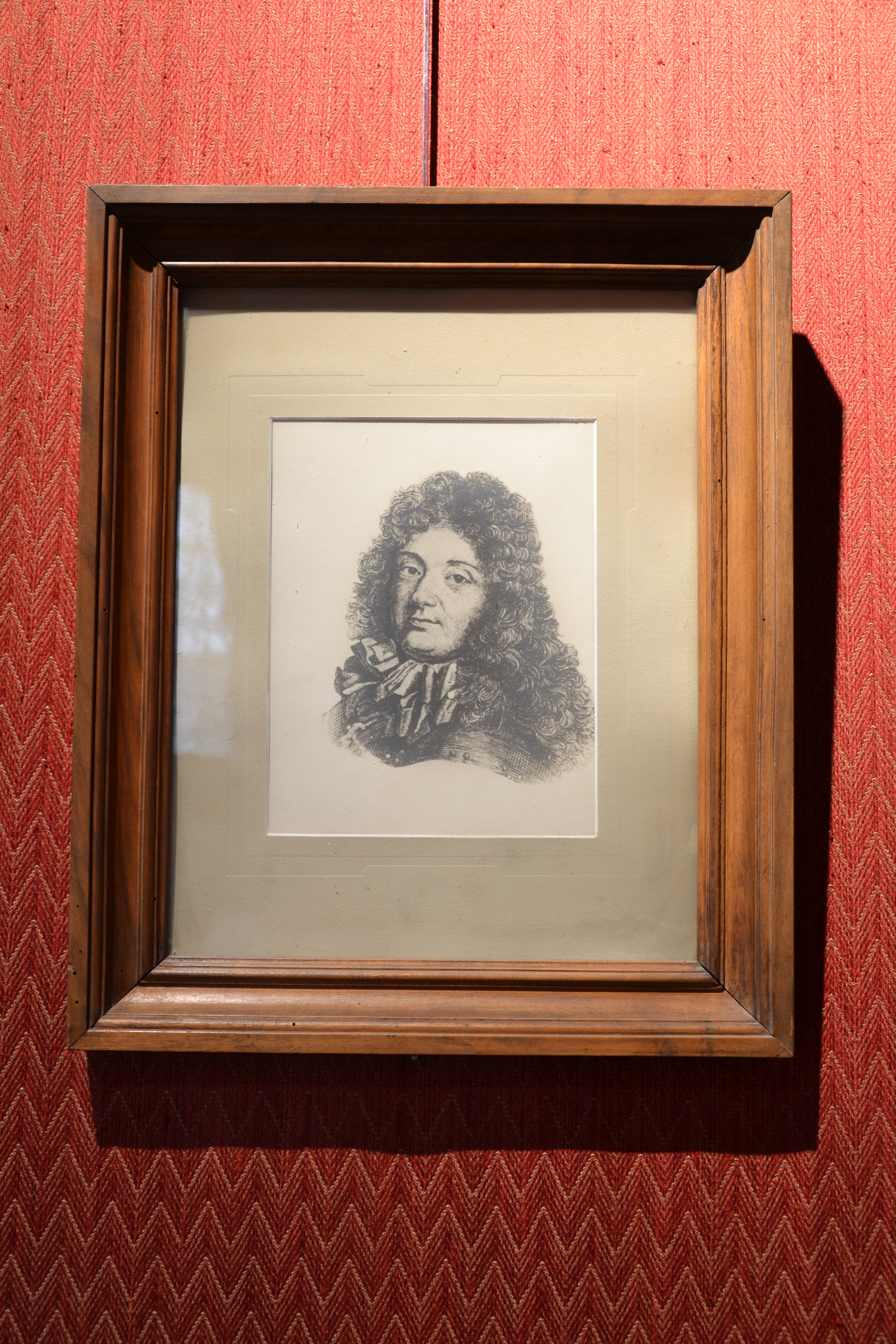 De Castellanne Adhémar d'Ornano, Comte de Grignan, Gouverneur de Provence, Salle des mariages de la mairie de Valréas, Château de Simiane .